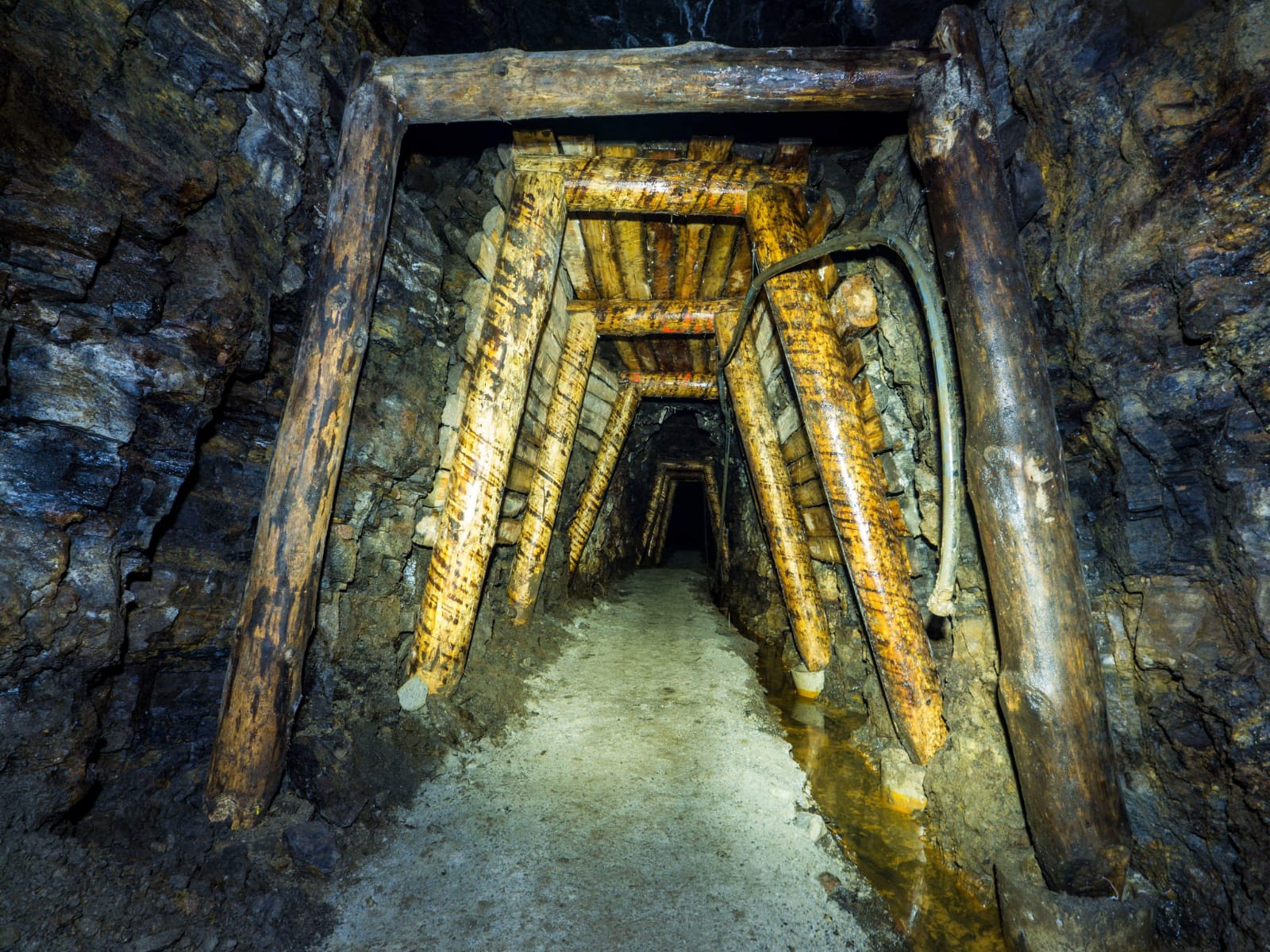 Innenansicht des Harrlstollens während der Sanierungsphase BP C103 Übergang Disthen Teil